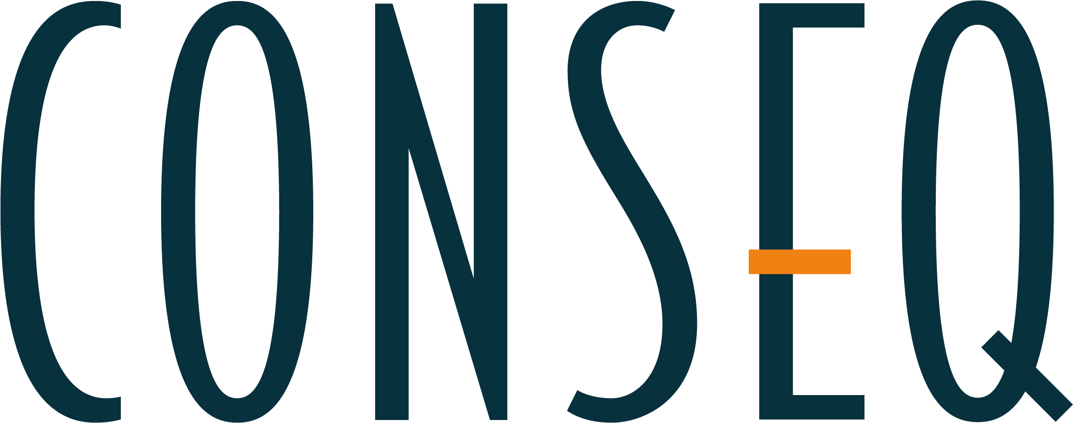 Logo společnosti Conseq Investment Management, a.s. používané pro vizuální identifikaci společnosti i celé finanční skupiny Conseq.